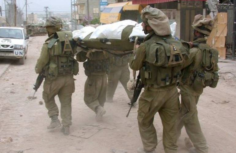 הקרב על ג'נין בחומת מגן